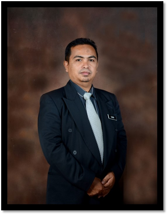 Encik Mohd Sabri bin Kasa @ Ghozali